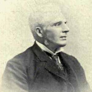 James Gilmour